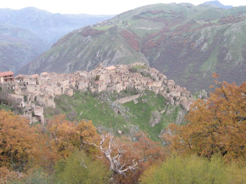 Romagnano, Campania, Italia